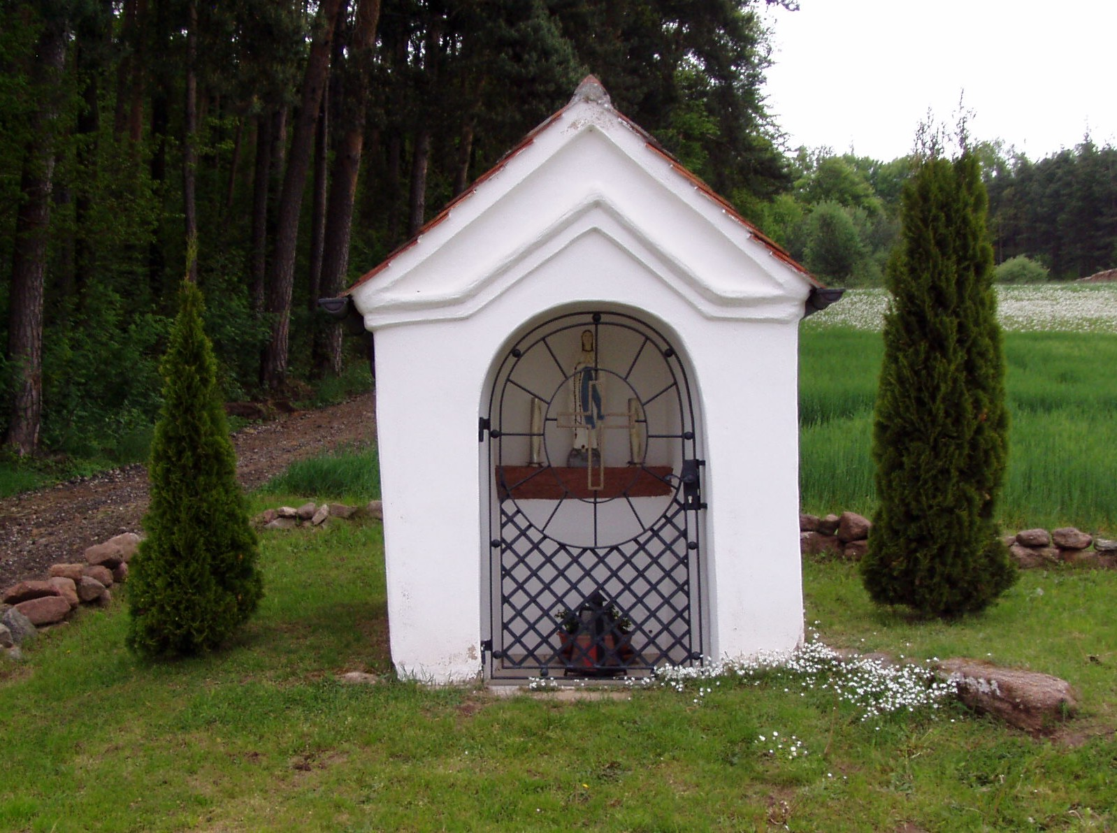 Stadt Spalt (Ortsteil Theilenberg) Am Weg nach UntererlbachThis is a photograph of an architectural monument.